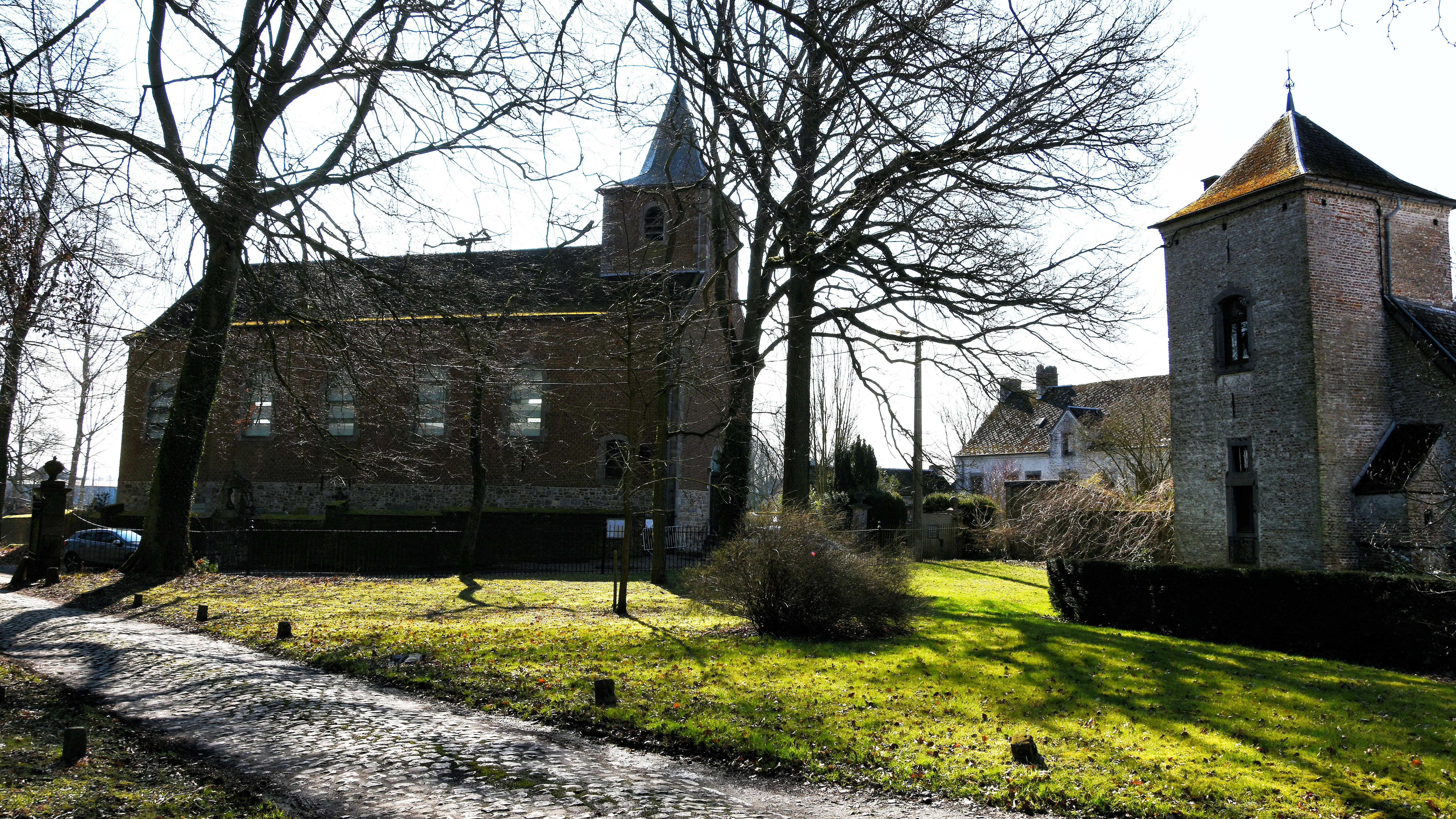 De Sint-Martinuskerk te Harlue (Bolinne), België